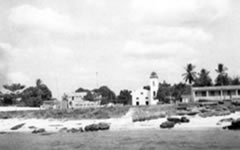 Foto Antiga da Cidade de Senador José Porfírio